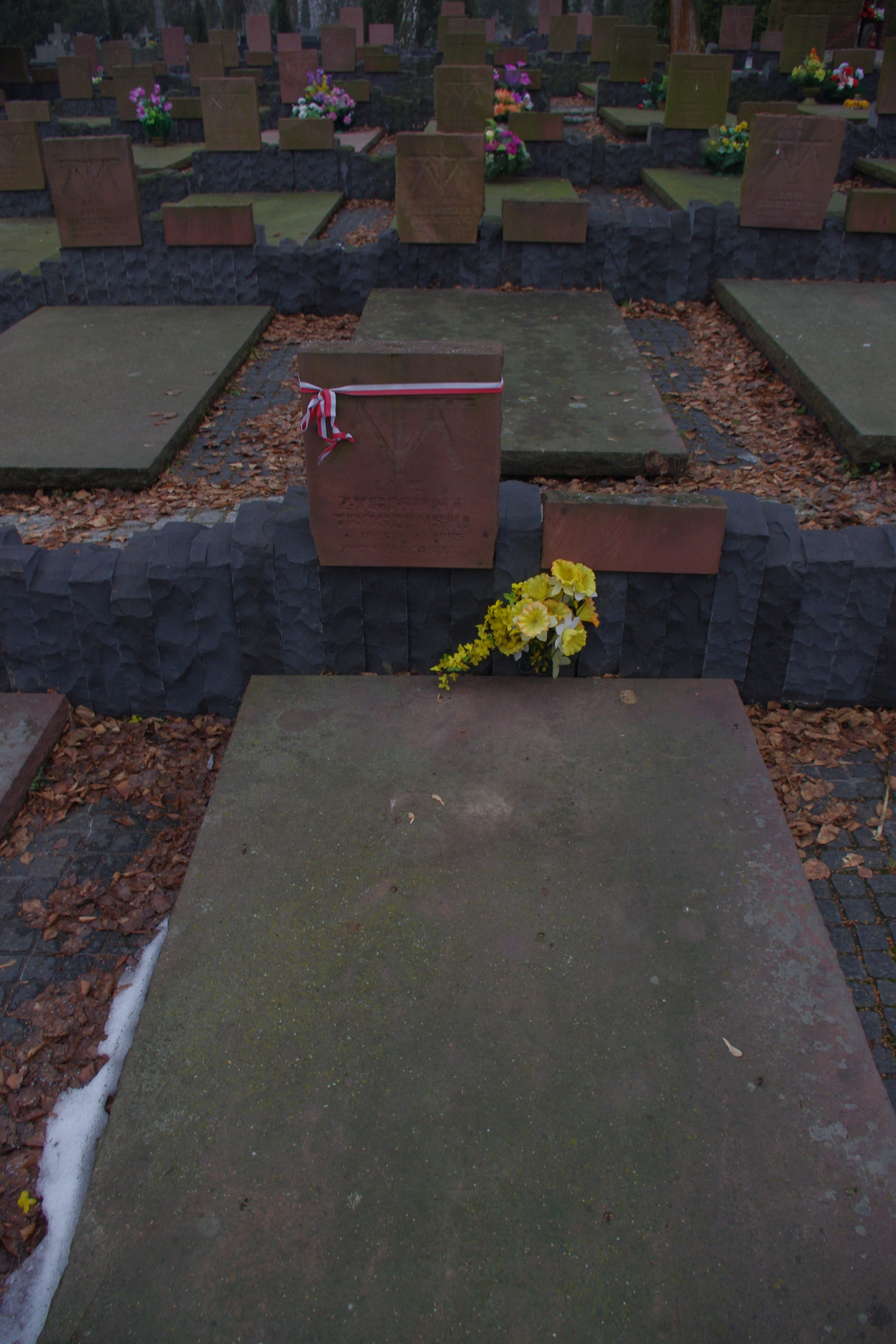 Grób marianina Zygmunta Trószyńskiego - kapelana AK w powstaniu warszawskim, w Kwaterze Braci Marianów na Cmentarzu Wawrzyszewskim w Warszawie